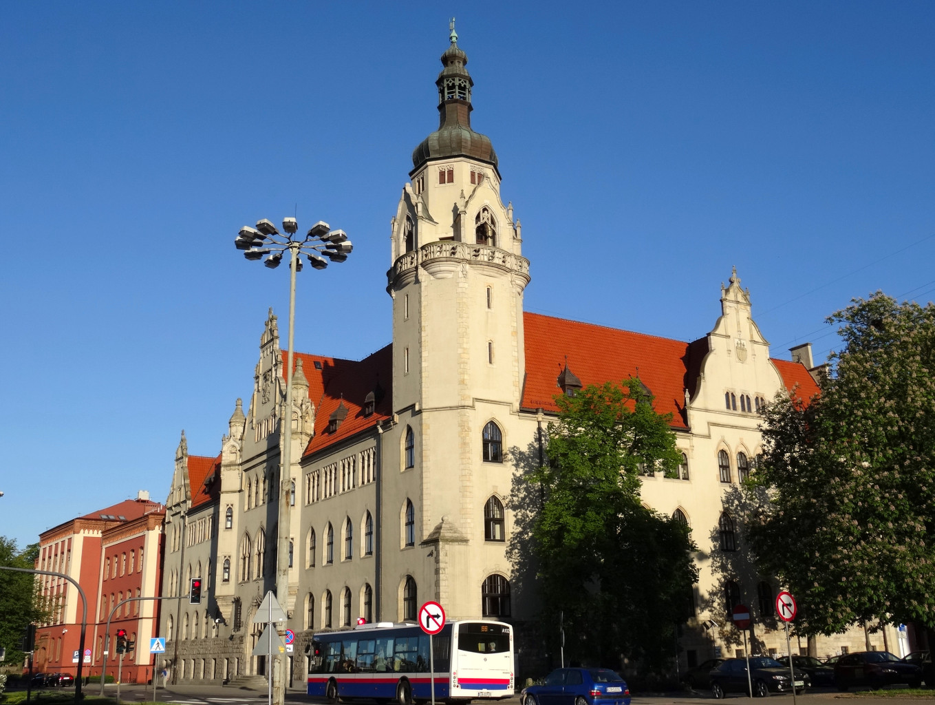 Budynek Sądu Okręgowego w Bydgoszczy (1903-1906) przy ul. Wały Jagiellońskie 2